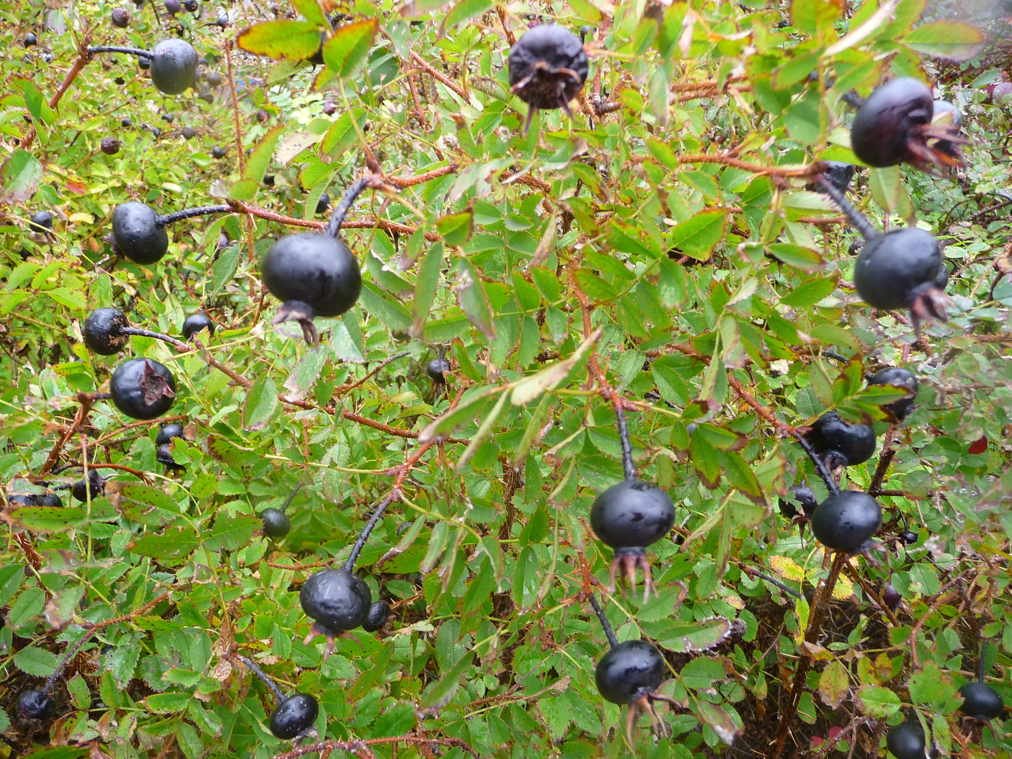 Hagebutten der Dünenrose (Rosa spinosissima), fotografiert auf der ostfriesischen Nordseeinsel Juist (Niedersachsen, Deutschland)